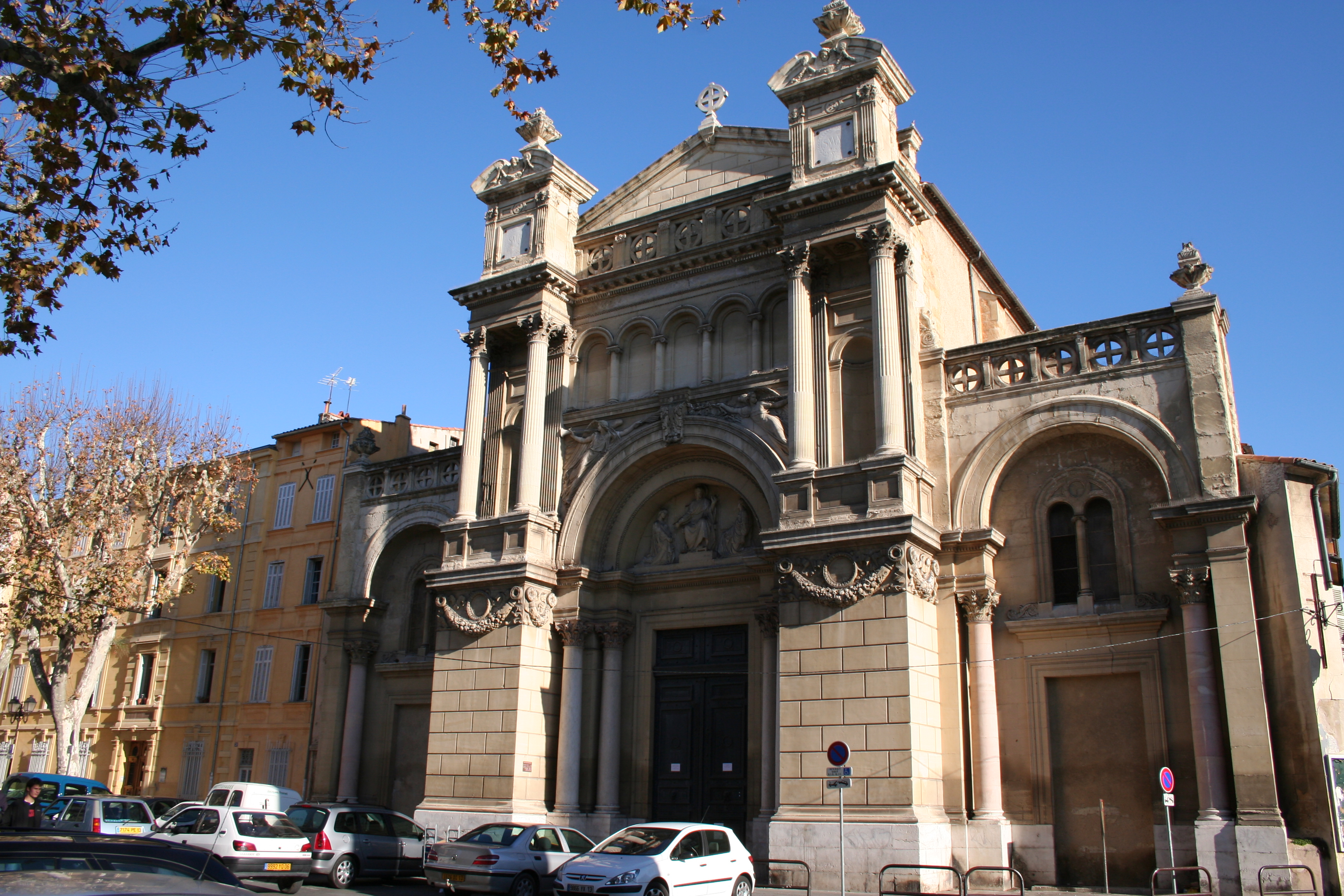 Église de la Madeleine, Aix-en-Provence (France).